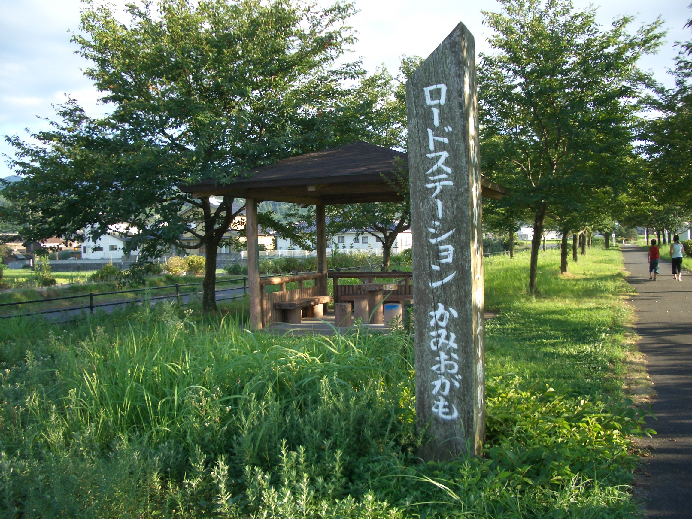 国鉄倉吉線上小鴨駅跡地にある、ロードステーションかみおがも標柱